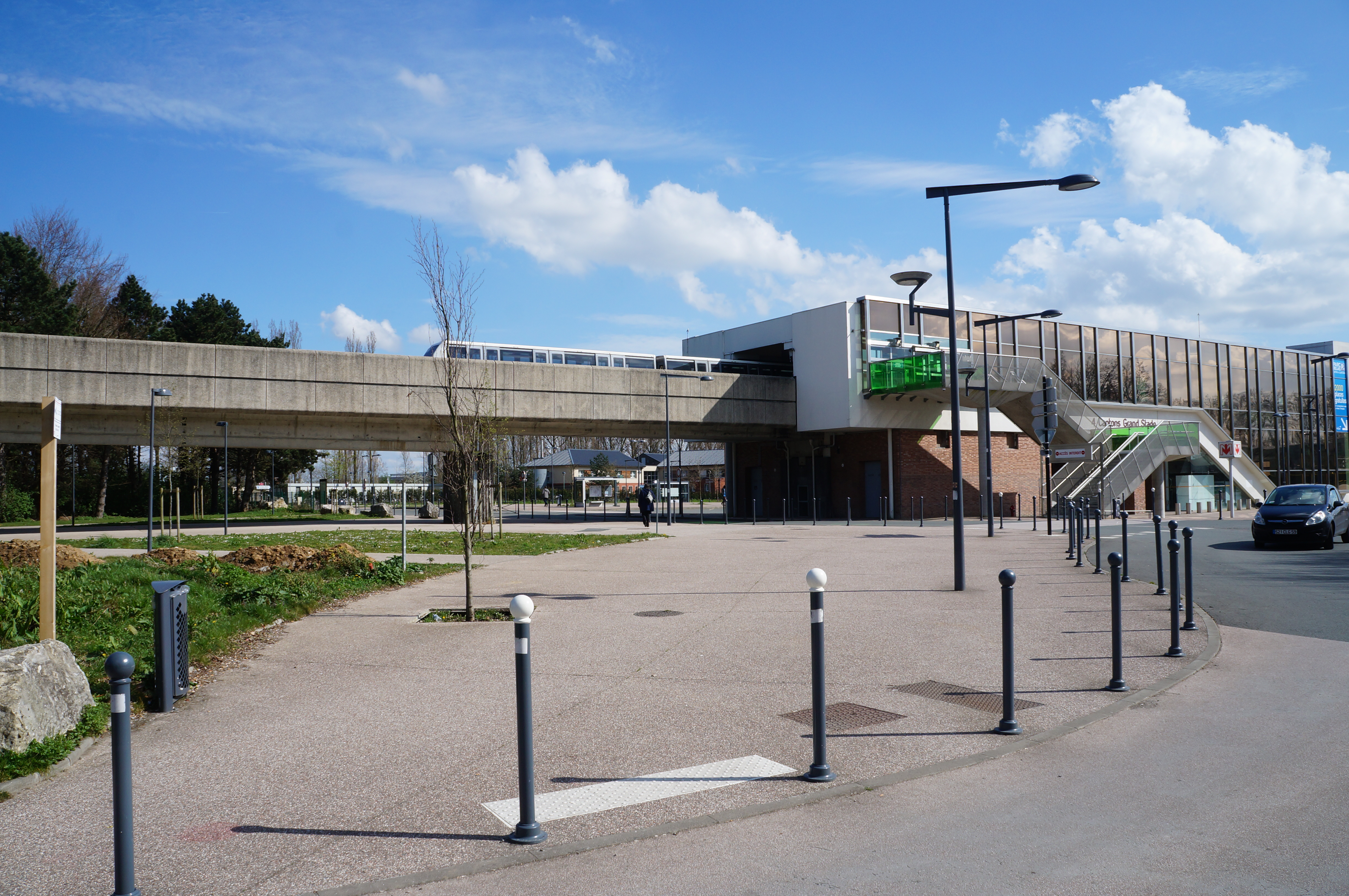 Station Quatre Cantons - Grand Stade de la ligne 1 du métro de Lille Métropole.